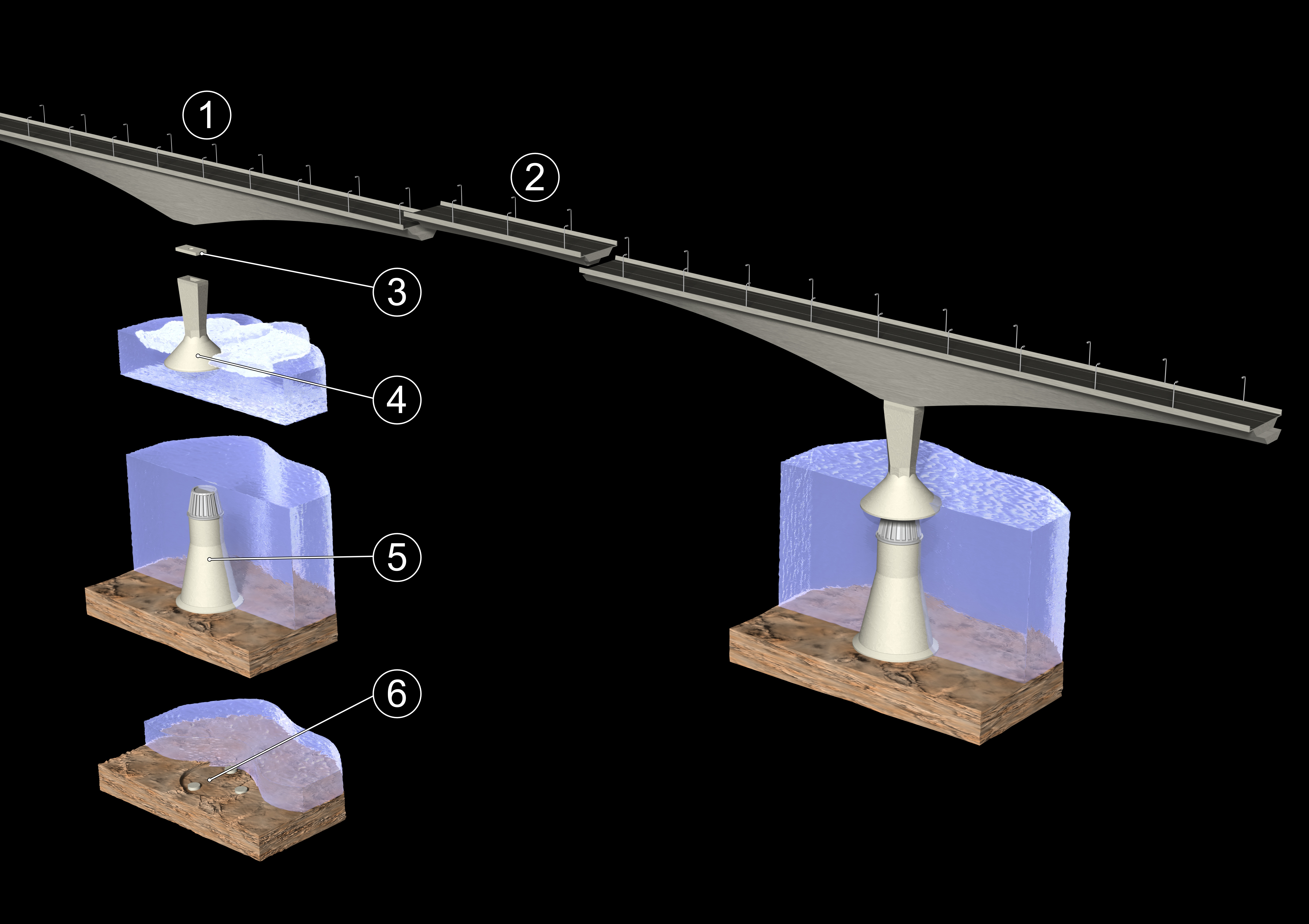 Modell eines Segments der Confederation Bridge mit Nummerierung. Hauptträger (Masse: 7500 t, Länge: 192,5 m) Einhängeträger (Masse: 1200 t, Länge: 60 m) Lager (Masse: 100 t, Maße: 10x5x1 m) Pfeiler mit konischer Basis (Masse: bis 4500 t, Höhe: 29–45 m, Durchmesser: 20 m am Schild, Die konische Basis dient als Eisschild an dem Eisschollen nach oben hin aufgebrochen werden) Fundamentpfeiler (Masse: bis 5400 t, Höhe: 14-43 m, Durchmesser: 22 m [Typ B1], 22x28 m [Typ B3], oval, an tieferen Stellen) Fundament (mit Pads) (Masse: 14,5 t, Höhe: 0,6 m, Durchmesser: 4,5 m)